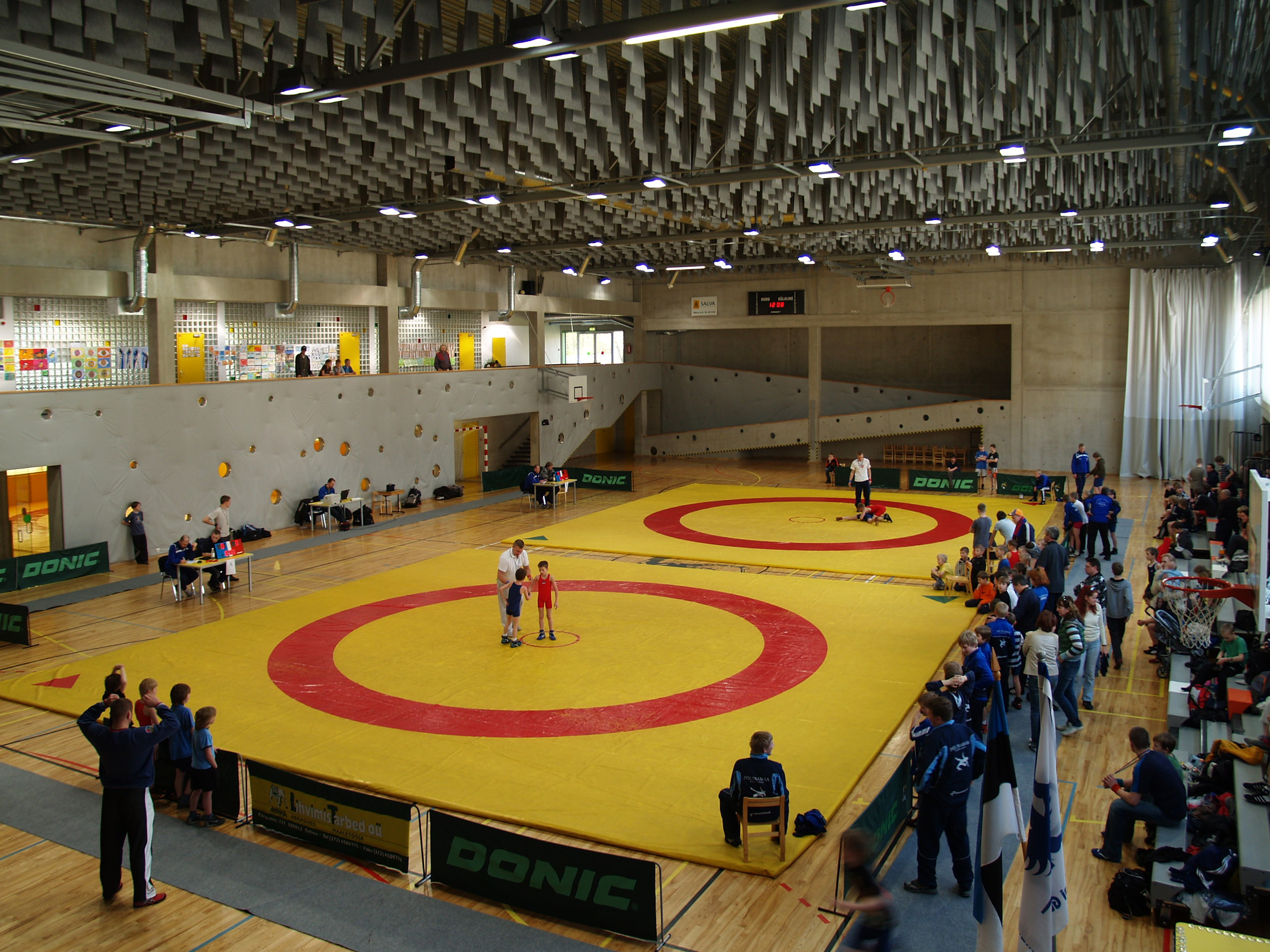 Suure-Jaani Gümnaasiumi spordisaal